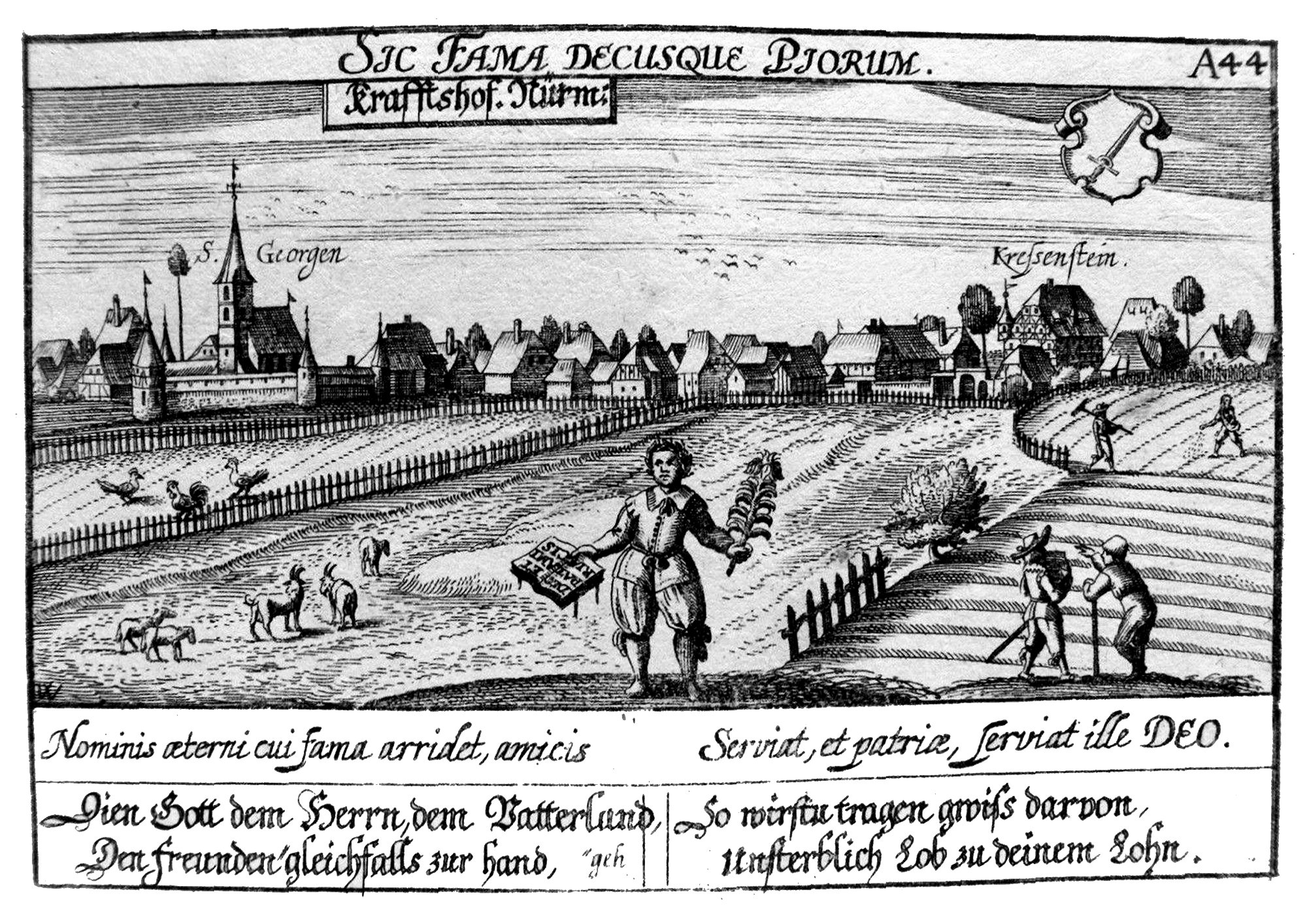 Kupferstich Daniel Meisner/ Kieser / Fürst Darstellung: Kraftshof bei Nürnberg A44 Thesaurus Pilopoliticus/ Meisner´s Politisches Schatzkästlein